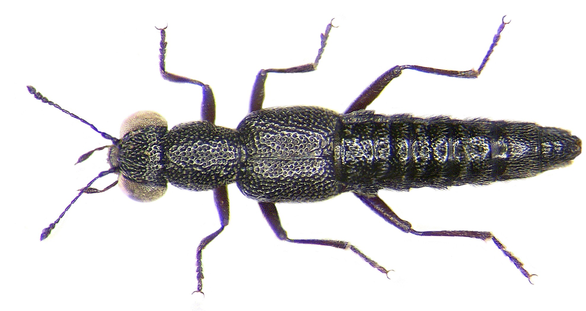 Familie: Staphylinidae Grösse: 3,2,8-3,5 mm Verbreitung: Europa Ökologie: verbreitet und nicht selten, an Ufern, in Feuchtgebieten Fundort: Germania, Bayern, Pressath leg.det. G.Uhmann, 1968 Foto: U.Schmidt, 2008